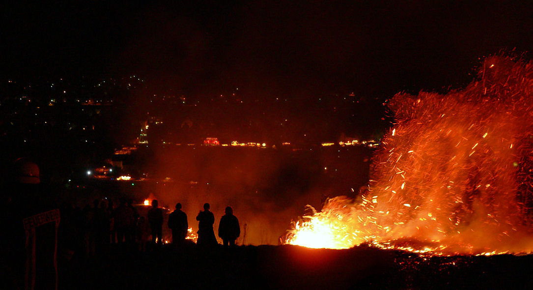 Osterräderlauf in Lüdge, im Hintergrund Lüdge